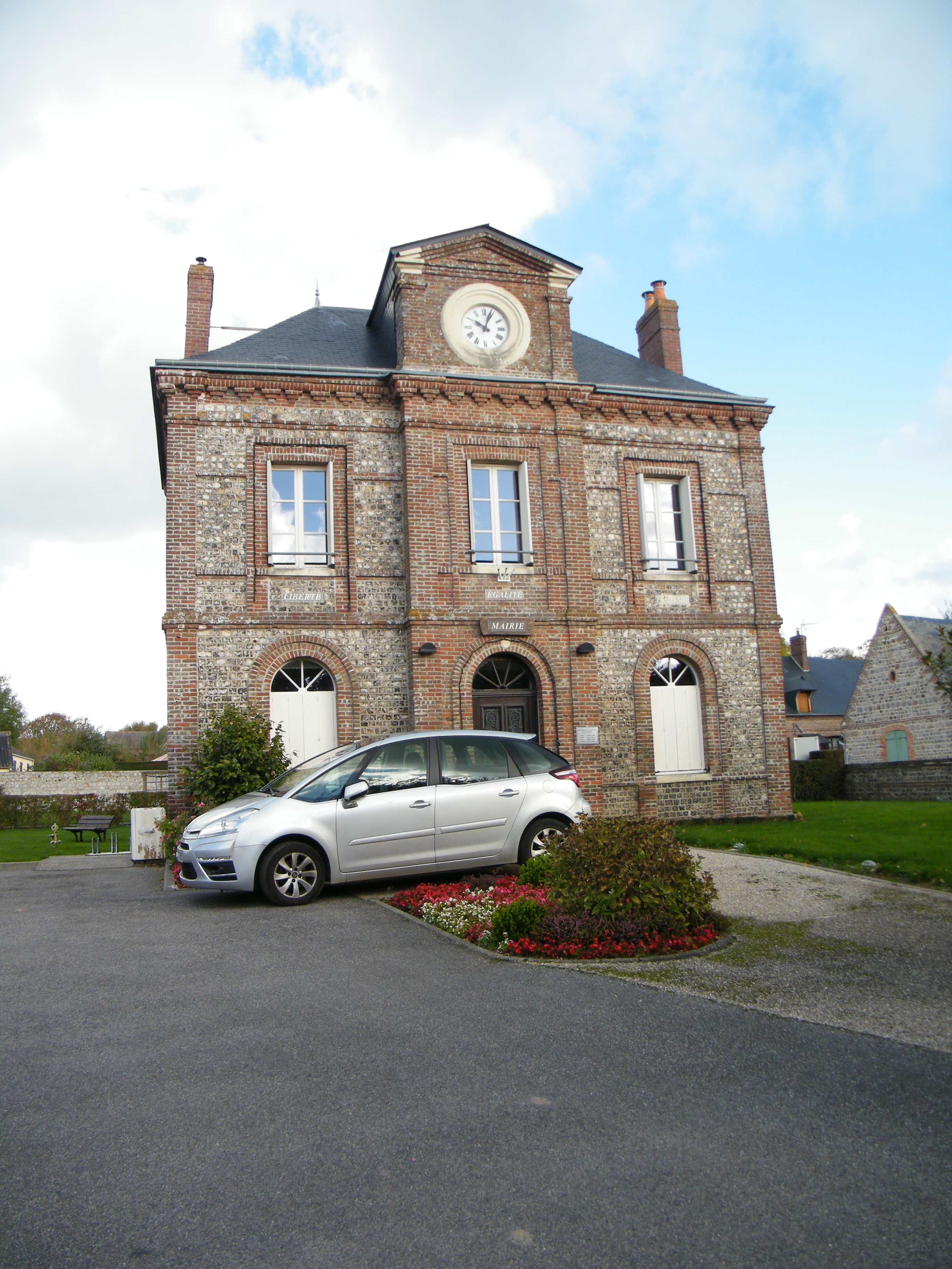 Sotteville-sur-Mer, Seine-Maritime, mairie.